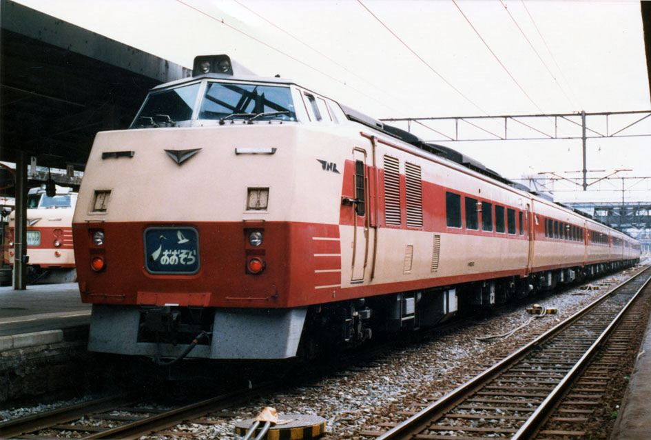 国鉄キハ183系気動車「おおぞら」